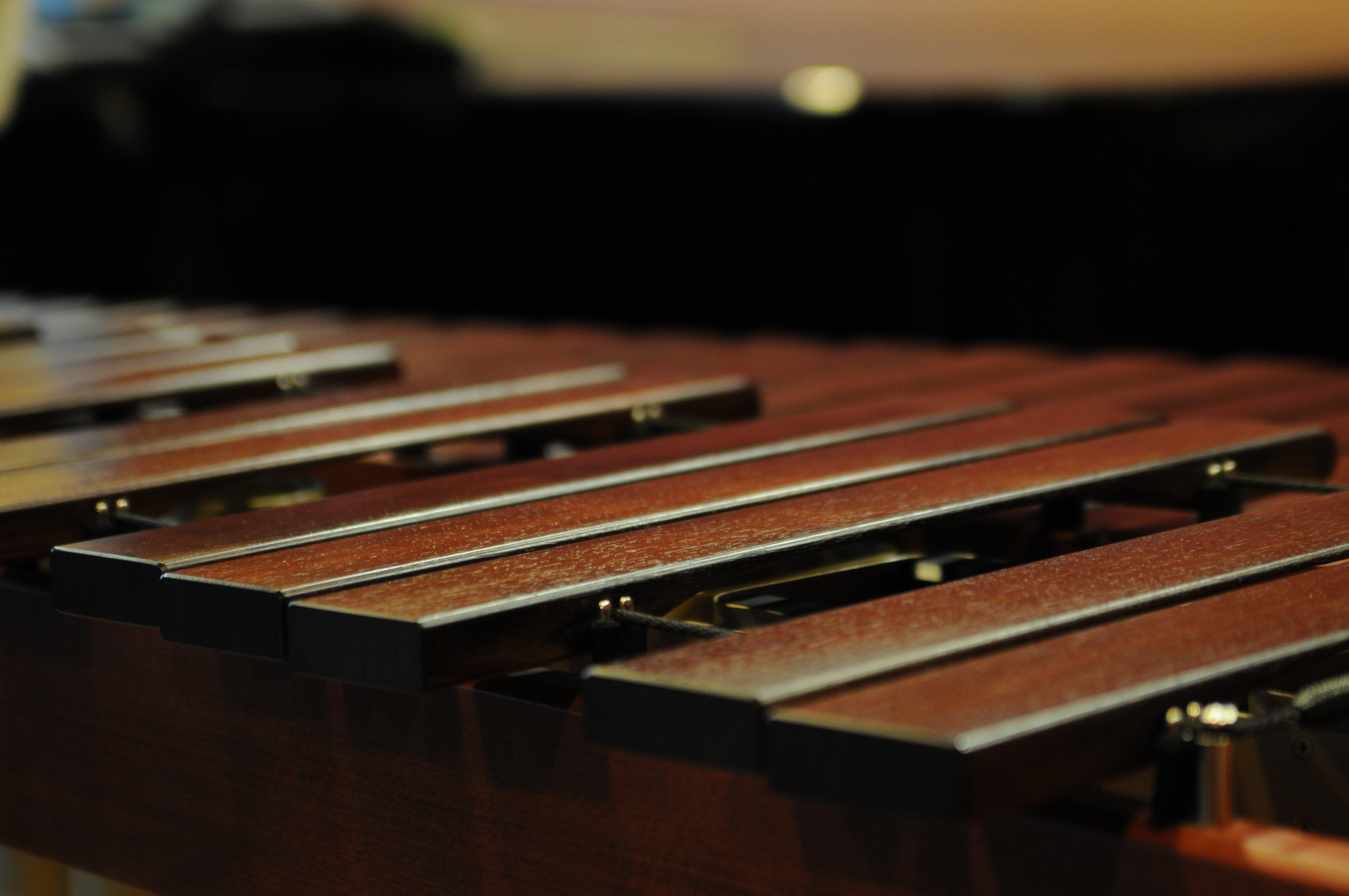 Marimba detail